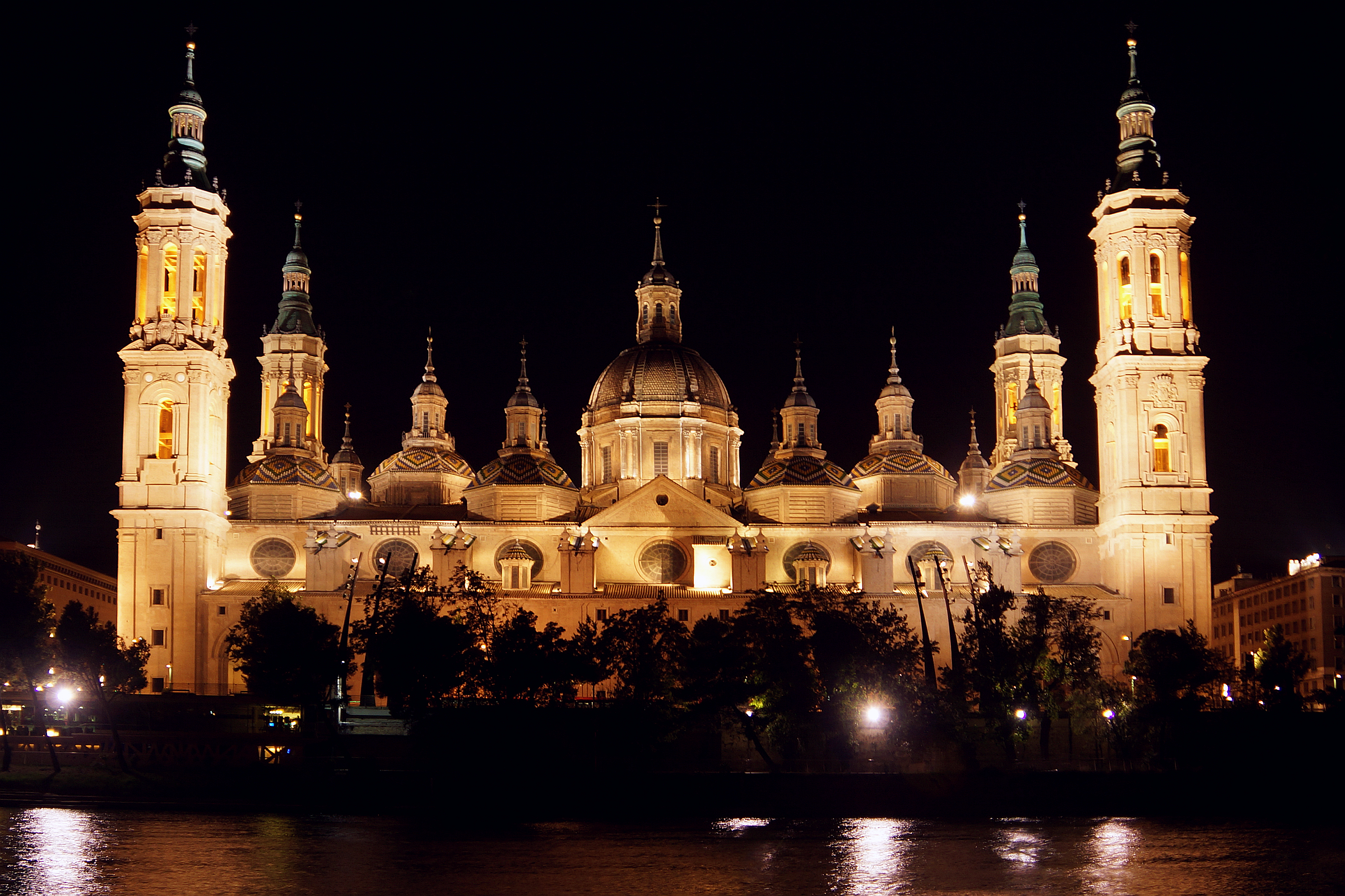 Nachtfoto mit Rio Ebro und beleuchteter Catedral-Basílica de Nuestra Señora del Pilar in Saragossa Aragomnien Spanien (Zaragoza Aragon Espagna/Spain) Foto Wolfgang Pehlemann DSC00612